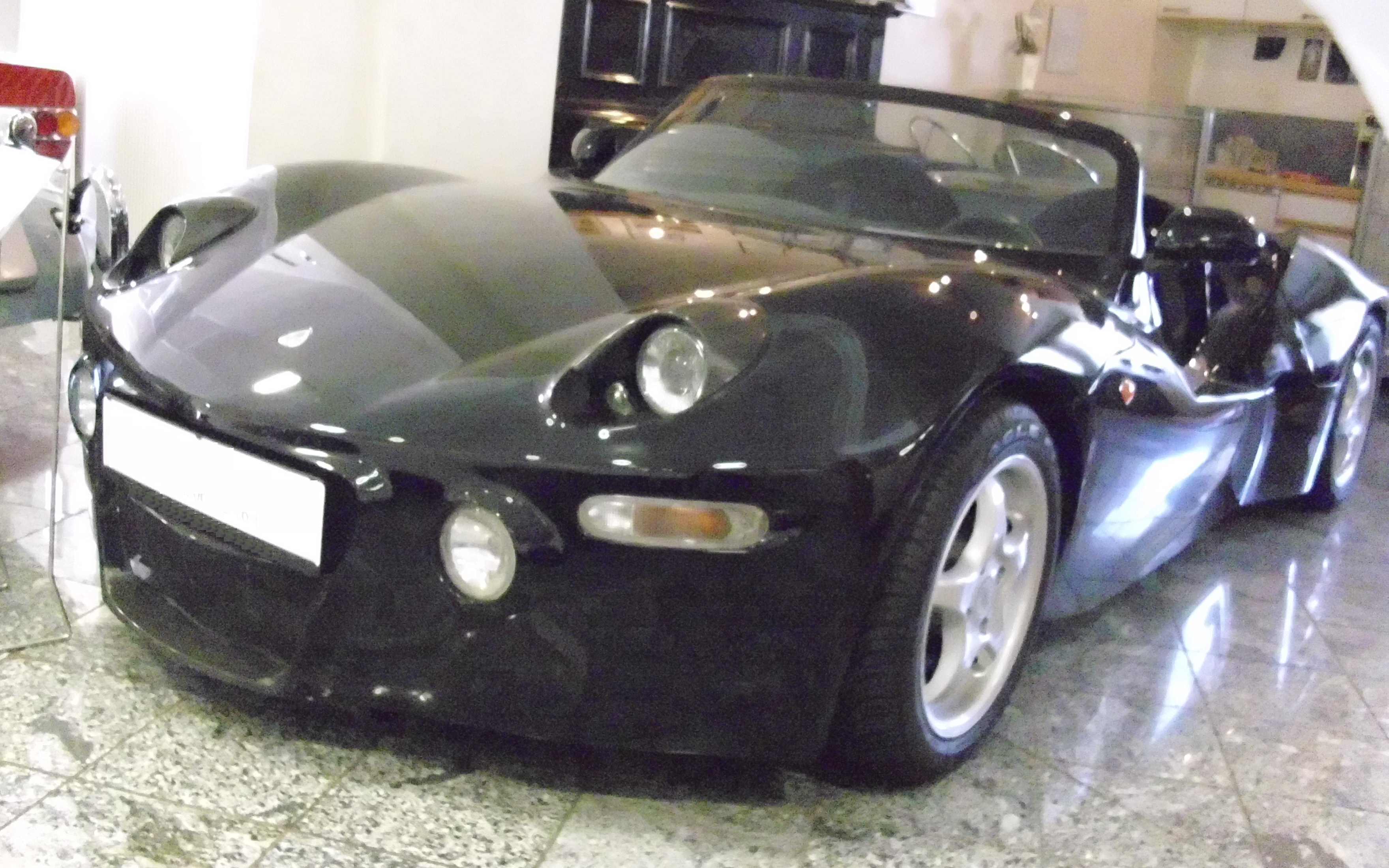 Zato L 3 S 2006